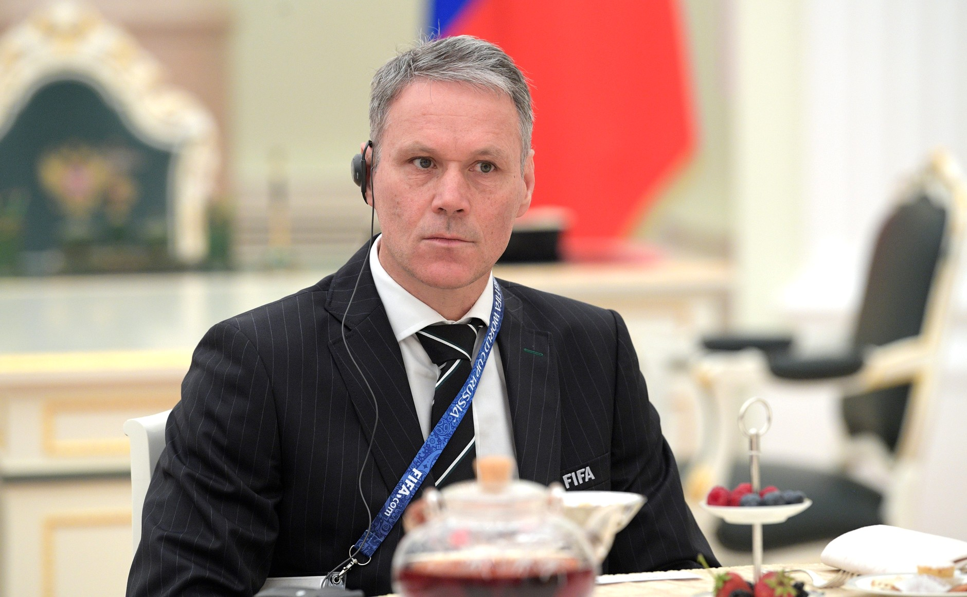 Встреча Президента Российской Федерации Владимира Путина с легендами мирового футбола. Чемпион Европы 1988 года в составе сборной команды Нидерландов Марко ван Бастен.